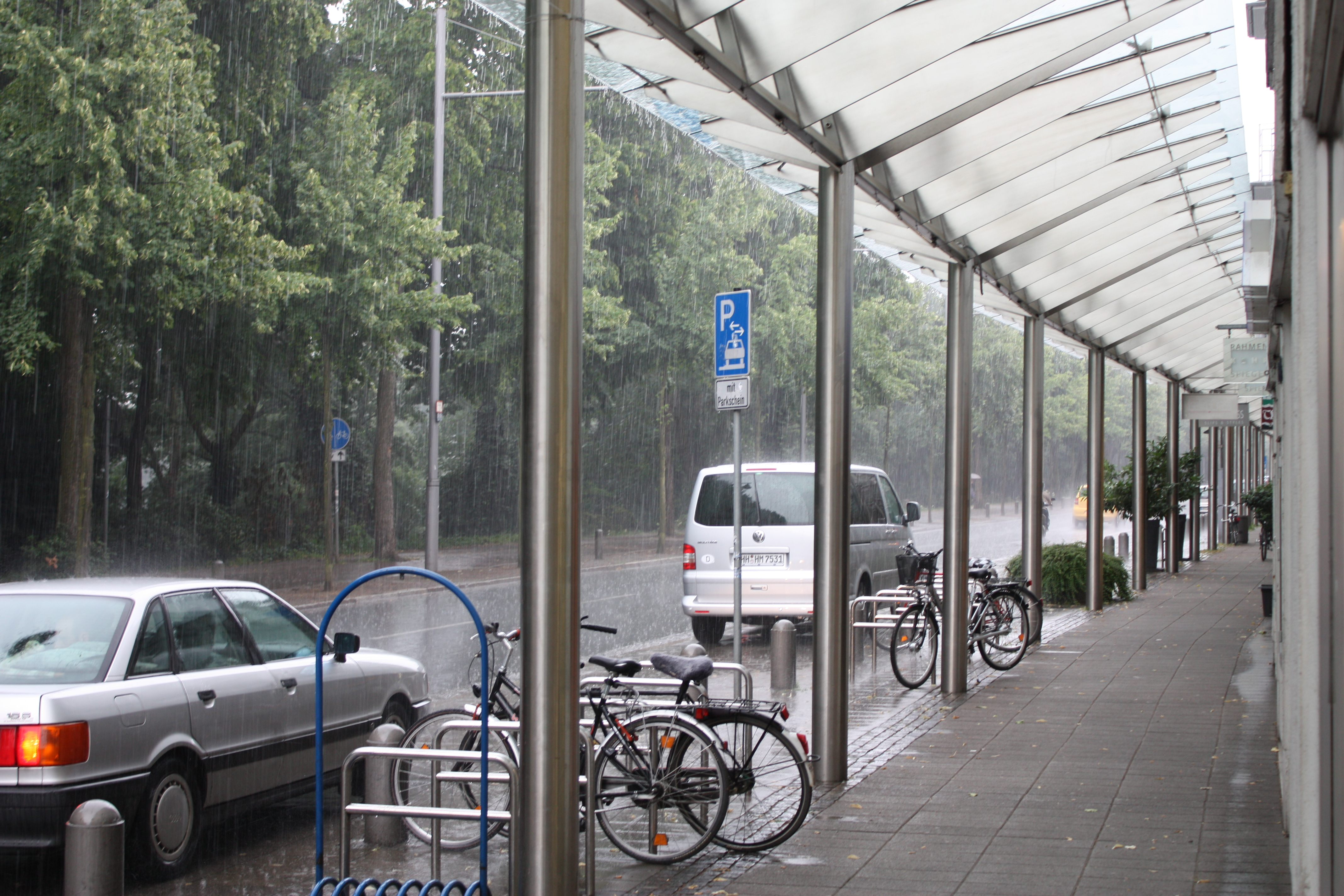 Bremen; Am Wall; bei Regen; 2009